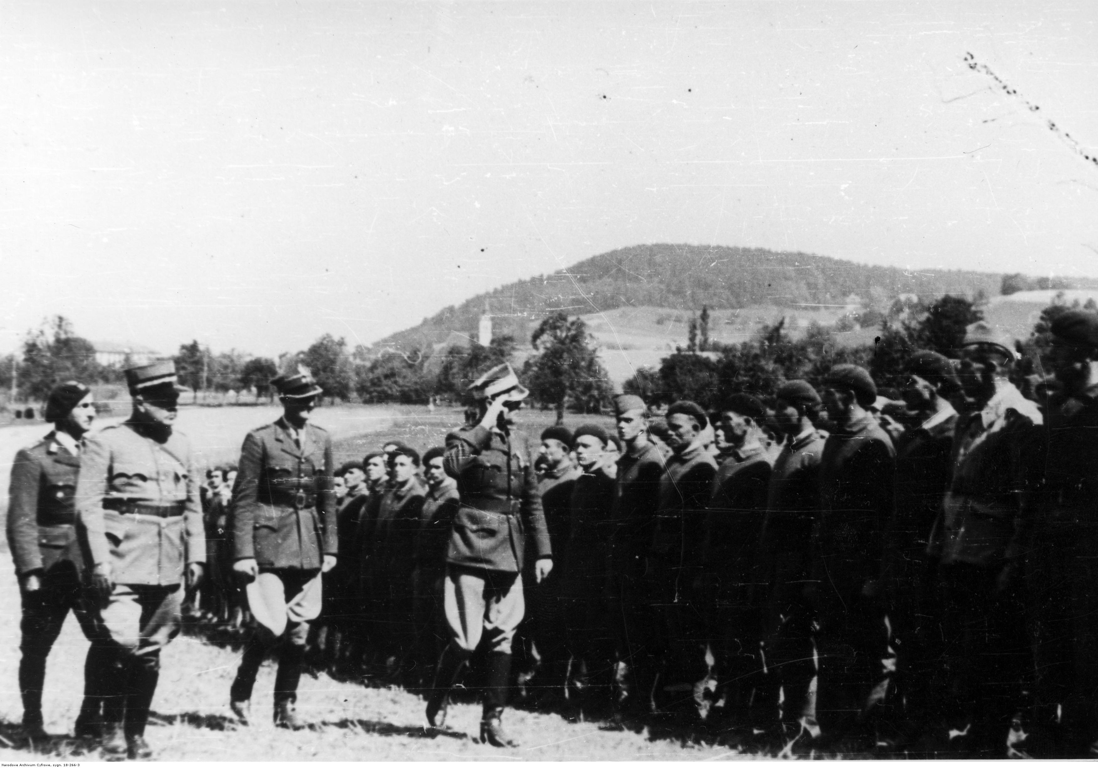 Uroczystość w 2 Dywizji Strzelców Pieszych internowanej w Szwajcarii - przegląd wojska. Na pierwszym planie od lewej: gen. Henri Guisan, NN, gen. Bronisław Prugar-Ketling. Archiwum Fotograficzne Czesława Datki. Sygnatura: 18-266-3